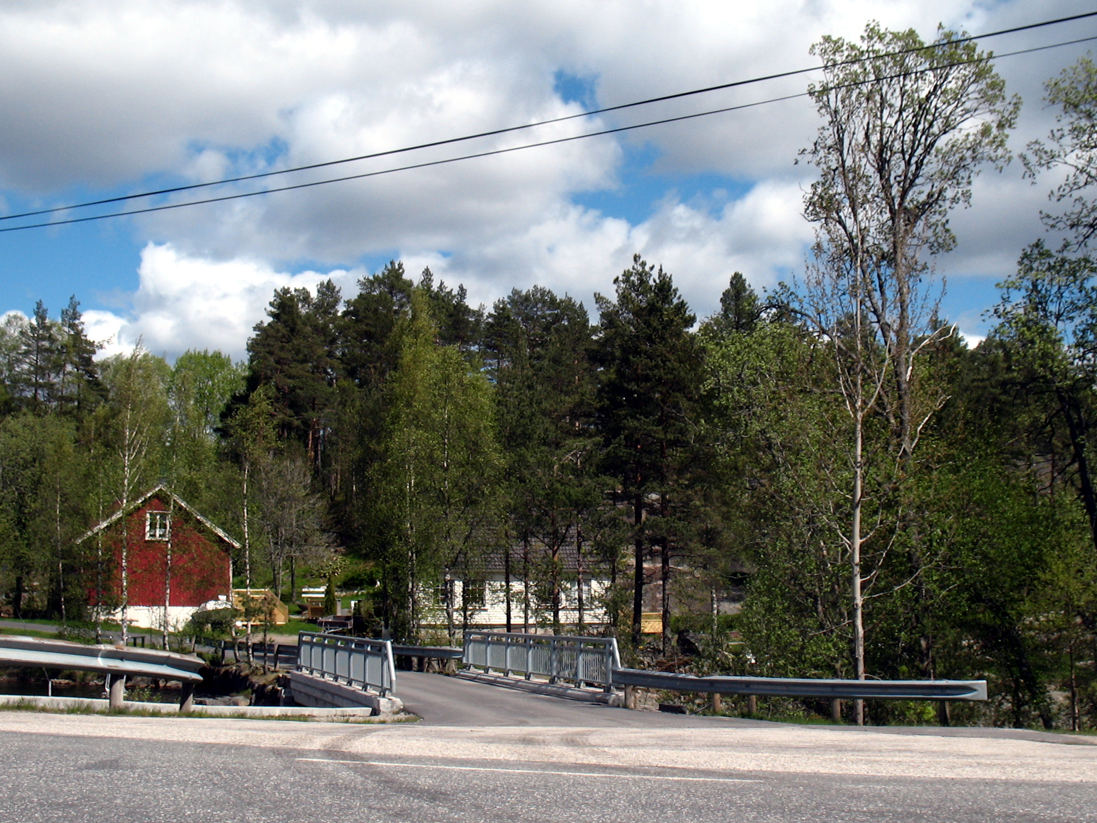 Solbakken, Vatnestrømsveien 70 på Vatnestrøm i Iveland, Aust-Agder. I 2015 er det hvite huset midt i bildet en bolig, men frem til 1890 drev blant annet Ole A. Benestvedt butikk her. Gnr 20/3.